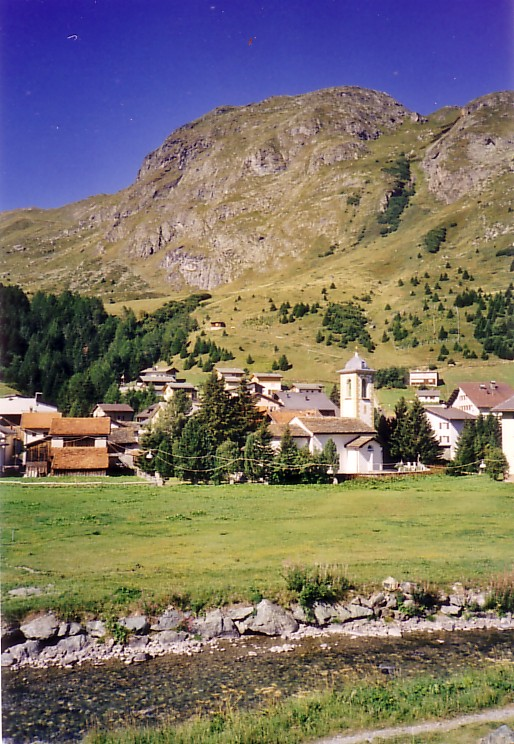 Bivio in 1769m Höhe.